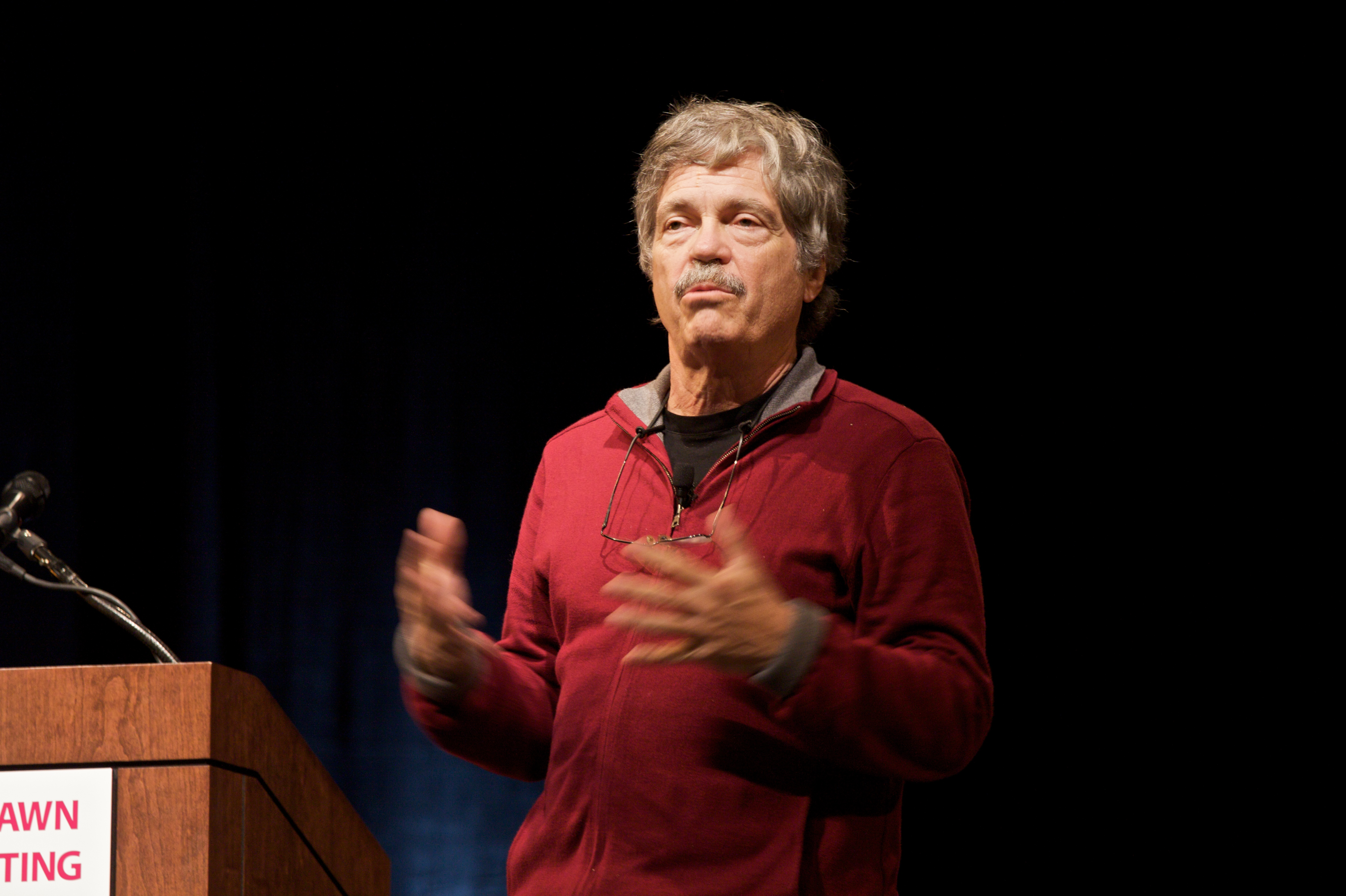 Alan Kay